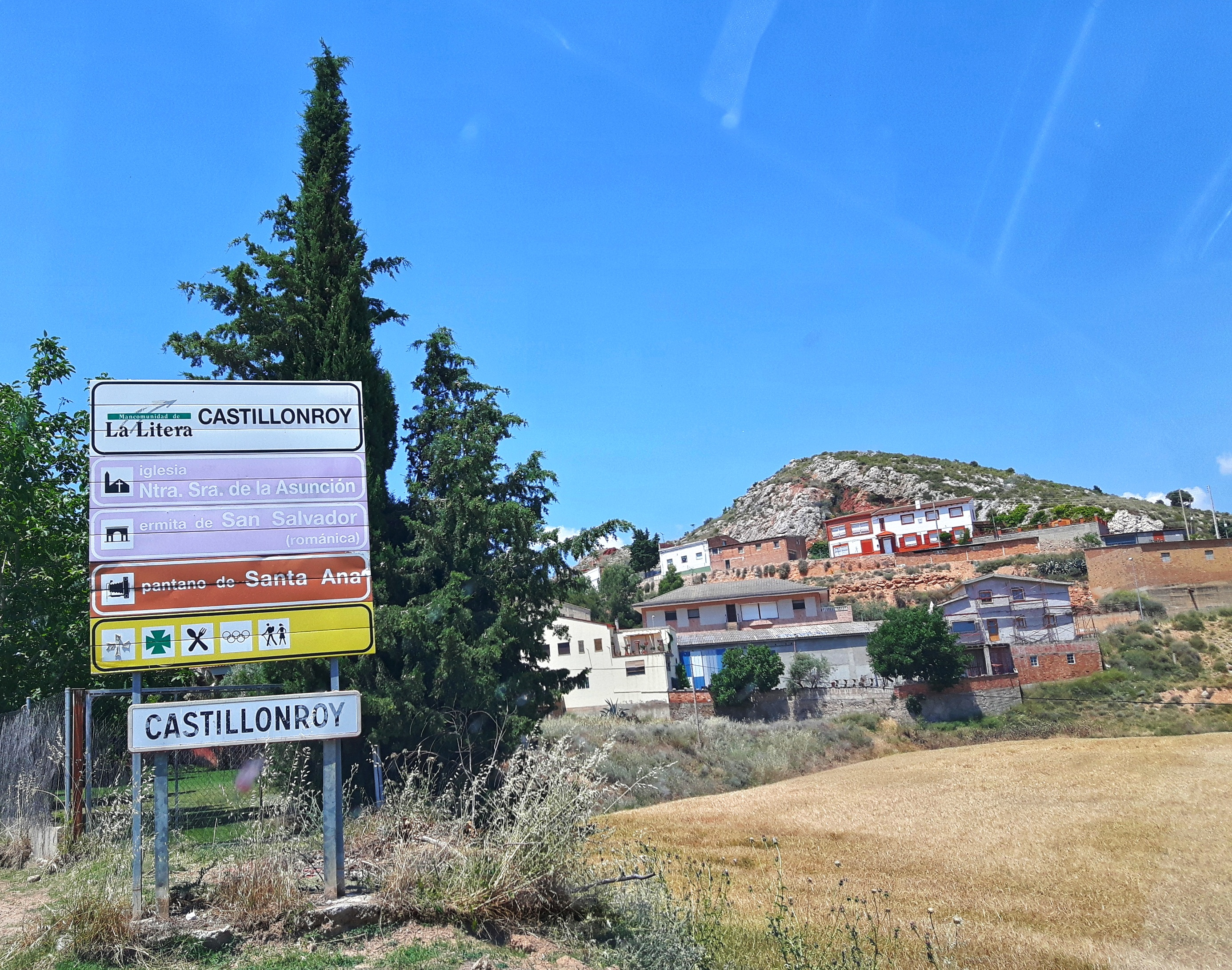 Castillonroy